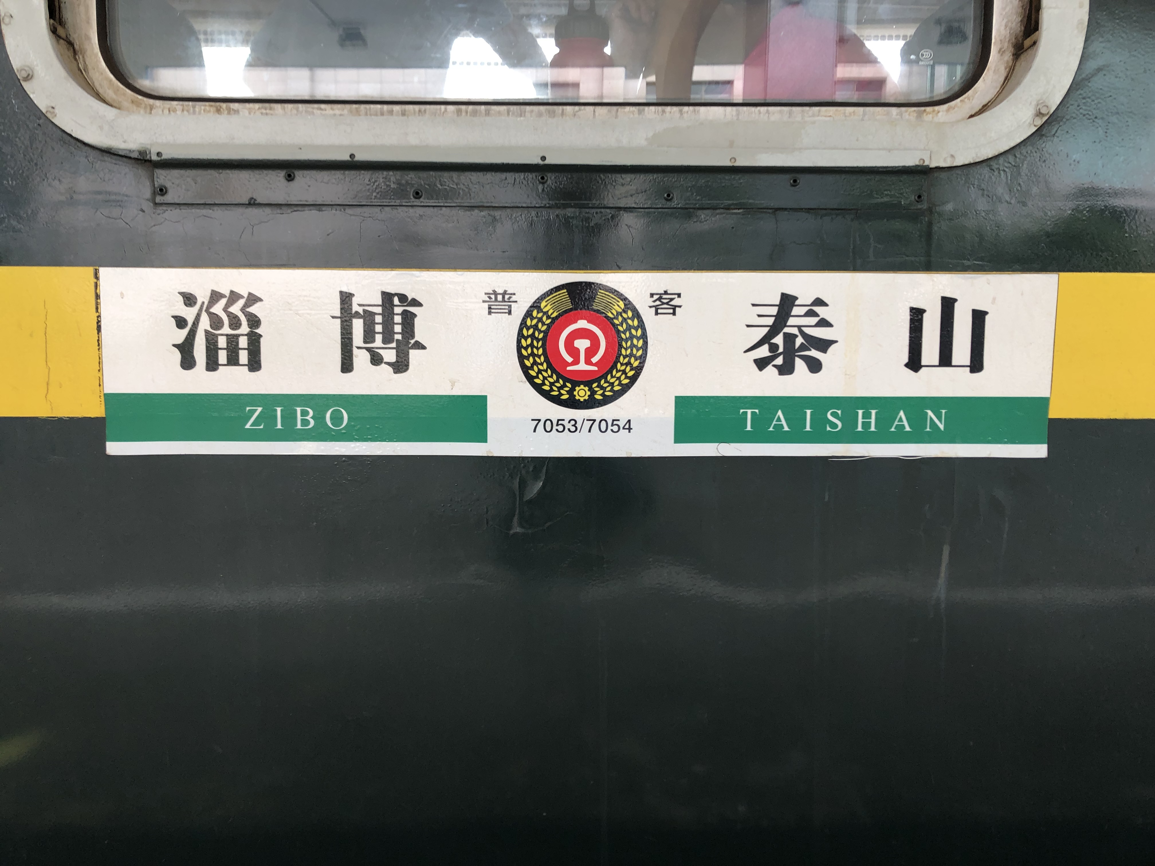 中文（中国大陆）: 7053/7054次列车的水牌，摄于泰山站。